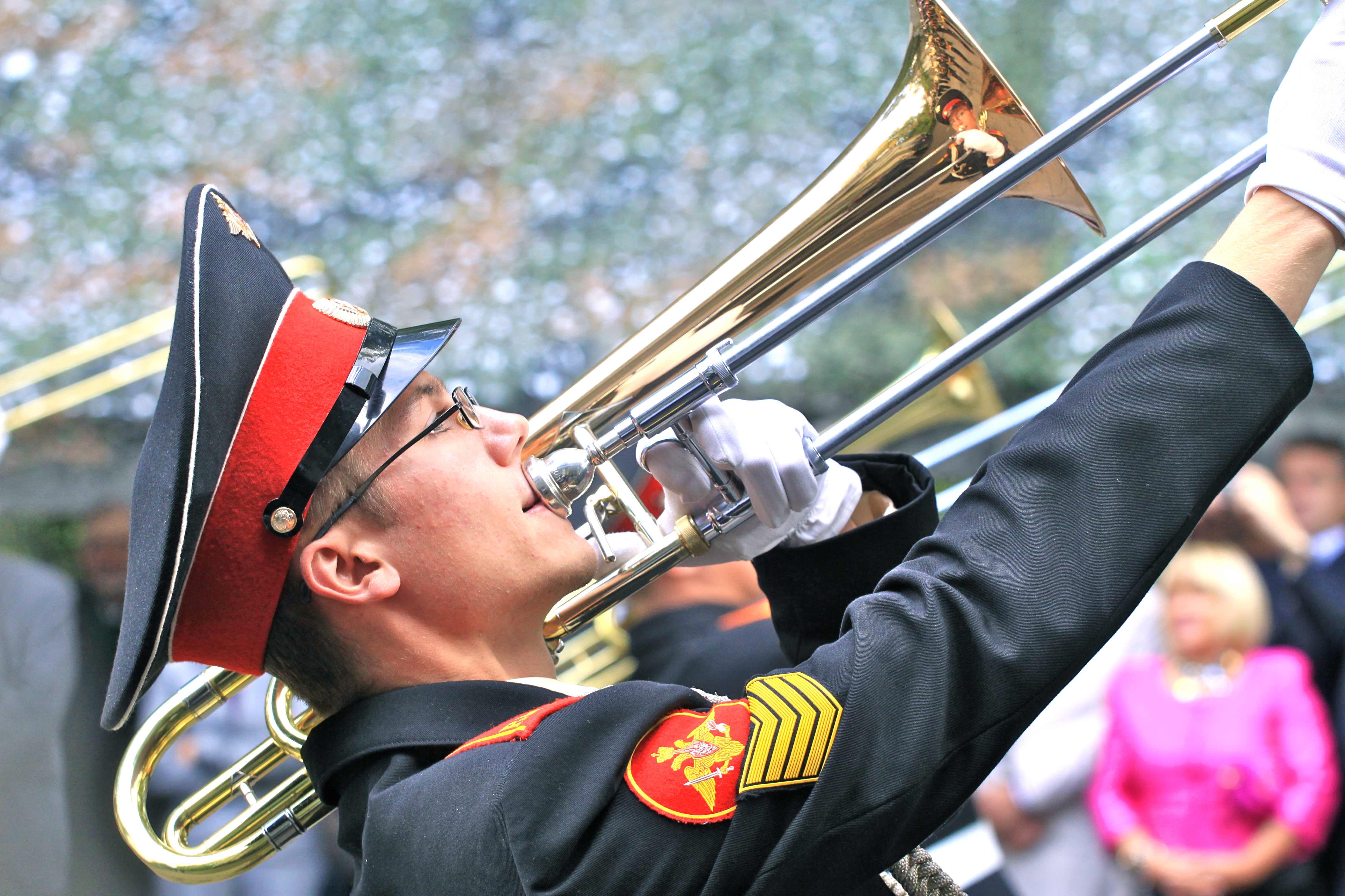 Sie dürfen das Foto mit Nennung des Autors honorarfrei vervielfältigen, verbreiten und öffentlich zugänglich machen. Foto: Jürg Vollmer / Infos